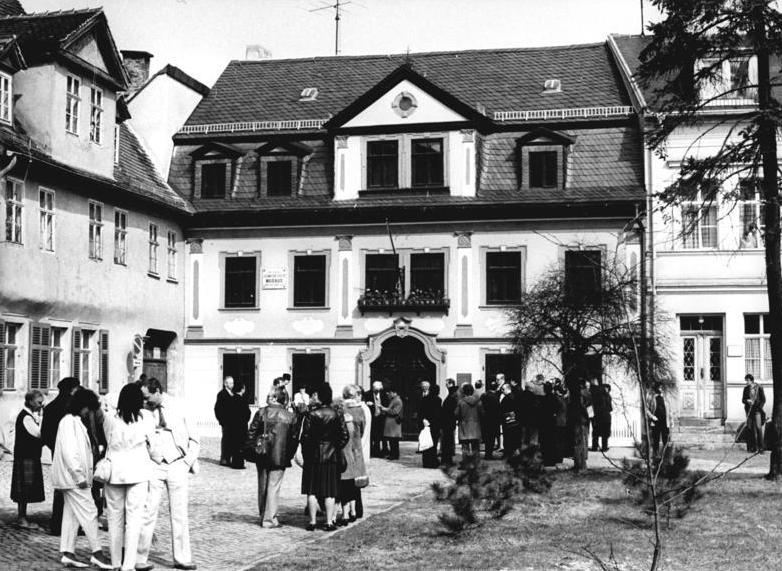 Weimar, Albert-Schweitzer-Gedenkstätte ADN-ZB Deutsche Demokratische Republik 25.4.1984 Das Musäushaus in Weimar - Gedenkstätte für Albert Schweitzer Das Musäushaus, 1754 am Rande des historischen Stadtkerns von Weimar (Bezirk Erfurt) im malerischen Winkel des Kegelplatzes erbaut, wurde nach umfassender Restaurierung im April 1984 vm Albert-Schweizer-Komitee der DDR als Gedenkstätte für den großen Humanisten und Arzt Albert Schweitzer (1875-1965) eröffnet. Der durch seine "Volksmärchen der Deutschen " (1786) bekannt gewordene Dichter Johan Carl August Musäus (1735-1785) bewohnte das Haus in seinen letzten Lebensjahren, es steht heute unter Denkmalschutz. Die Ausstellung im Obergeschoss der Gedenkstätte folgt dem Lebensweg Albert Schweitzers und den Hauptgebeiten seines Wirkens u.a. im Tropenhospital Lambarene, auf Vortragsreien durch verschiedene Länder und seinem konsequenten Eintreten für den Frieden, wofür er 1953 den Nobelpreis erhielt. Gewürdigt werden auch seine Leistungen als Philosoph, Theologe und Organist. Im Erdgeschoß des Hauses liegen u.a. Vortragsräume. Der überdachte stille Hof hinter der Gedenkstätte gibt Besuchern die Gelegenheit, sich in der warmen Sommerzeit ein wenig auszuruhen. Die Errichtung der Albert Schweitzer-Gedenkstätte reiht sich würdig in die mannigfaltigen Bemühungen des sozialistischen deutschen Staates ein, den großen Humanisten zu ehren. Die Stadt Weimar, jährlich von Tausenden in-und ausländischen Gästen besucht, bietet sich für dieses Vorhaben als Sinnbild wertvoller humanistischer Tradition aus der Geschichte des deutschen Volkes und der Menschheit an, denen Schweitzer sich aufs engste verbunden wußte und deren Erschließung er einen wesentlichen Teil seiner seiner Lebensarbeit widmete. Es geht um Weimar als Wirkungsstätte von Johann Sebastian Bach, von Johann Wolfgang von Goethe, Friedrich Schiller und Johann Gottfried Herder.